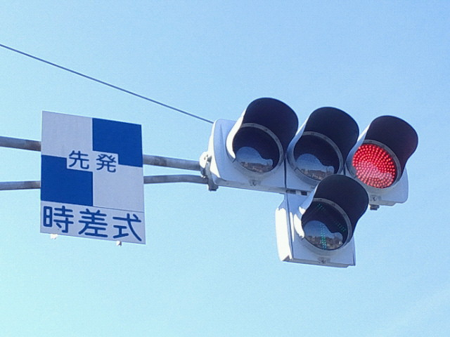 東京都八王子市の国道16号線に設置されている時差式信号機（先発）表示板と信号灯器